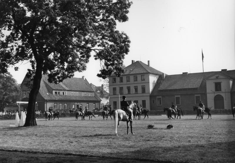 Große Dressurquadrille der 25 Hengste vor dem griechischen Königspaar während seines Besuchs auf dem Landgestüt Celle am 21.9.56